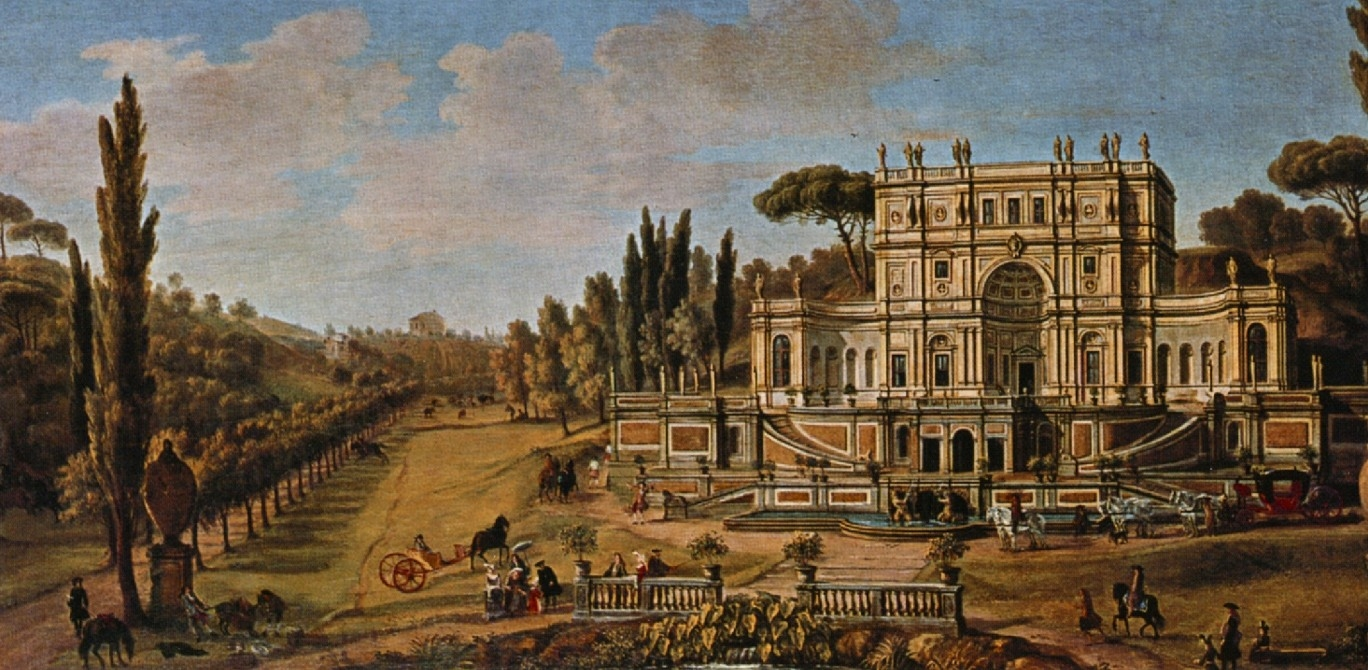 Villa Sacchetti al Pigneto